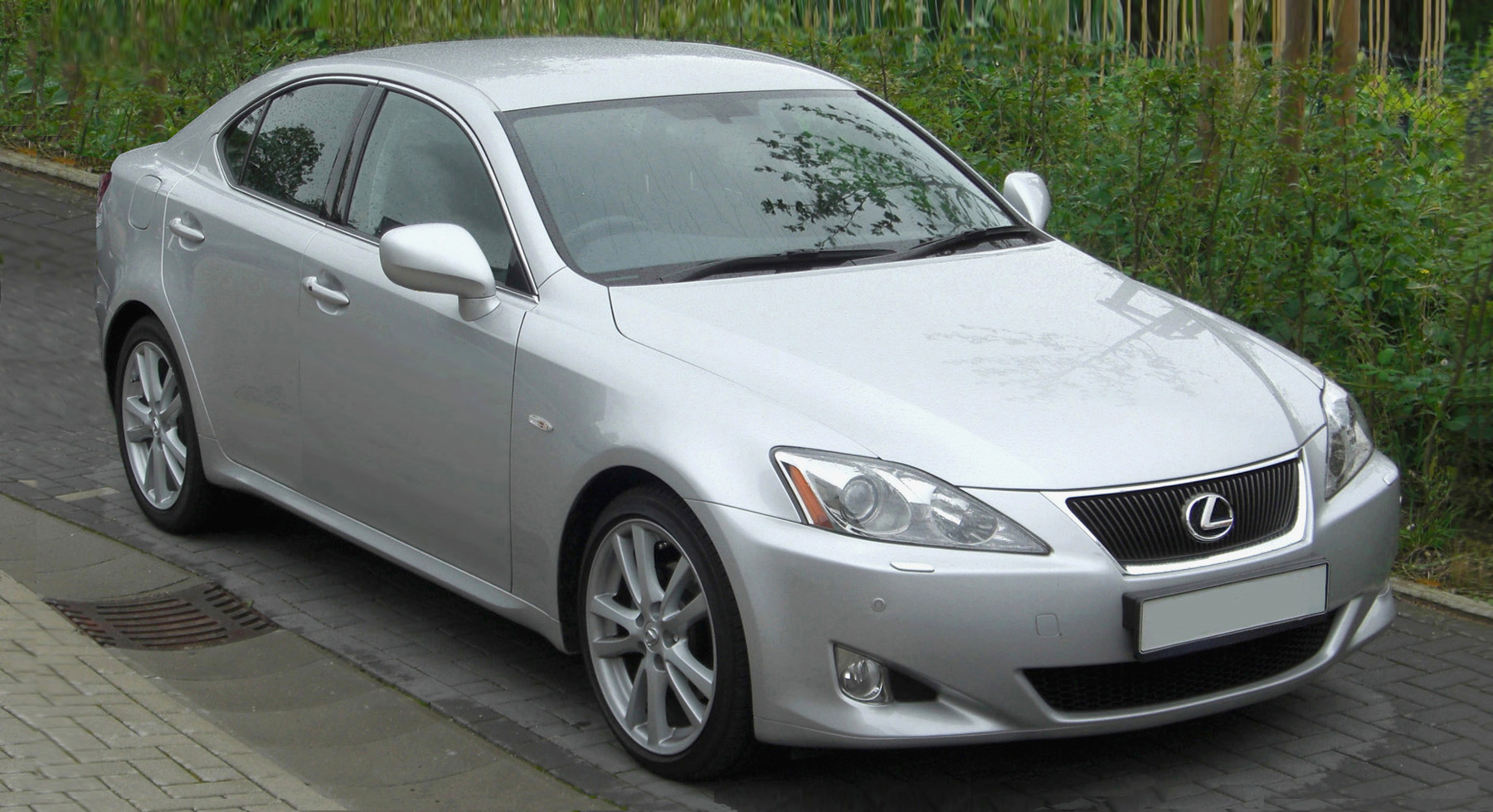 Lexus IS250